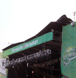 Problemas con el escenario Heineken durante la edición de 2005 de Festimad.